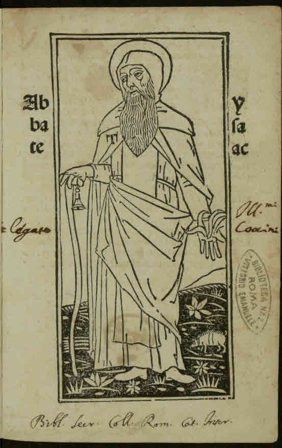 De perfectione vitae theoreticae (italiano). - Venetiis : per Bonetum Locatellum presbiterum, 1500. - 70 c. ; a-h⁸, i⁶ ; 8°.